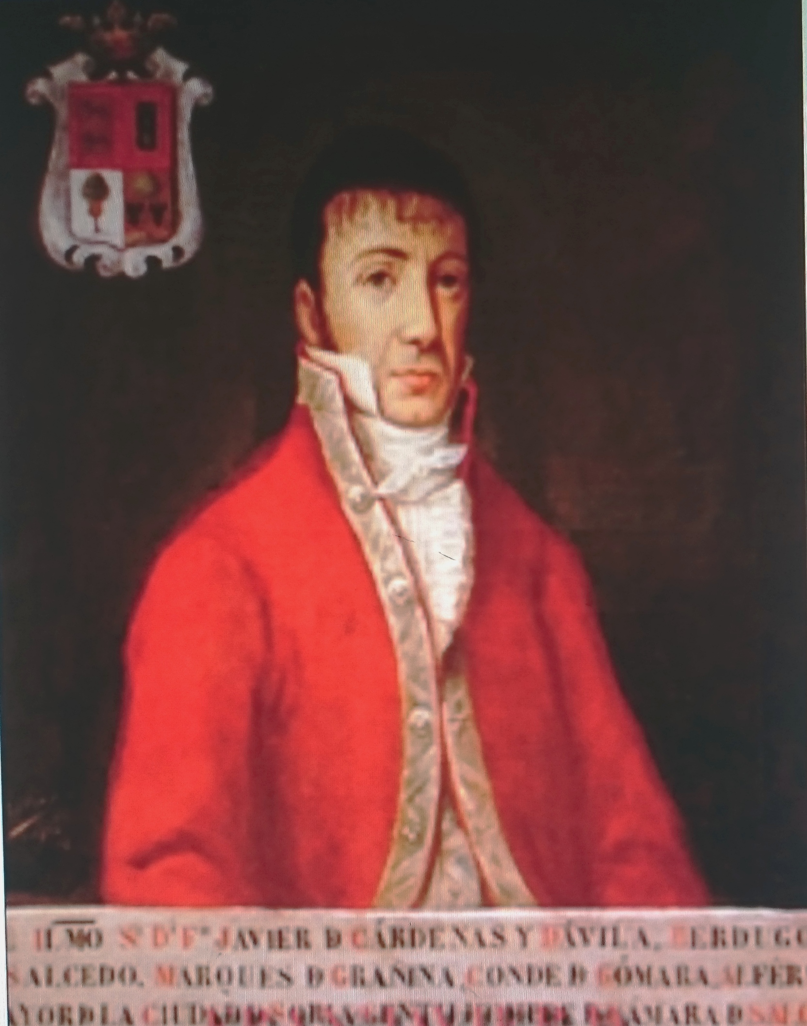 Francisco Javier Cárdenas y Dávila, IV marques de Grañina y V conde de Gómara. Hermano mayor de la Hermandad de la Soledad de Sevilla. Andalucía, España.